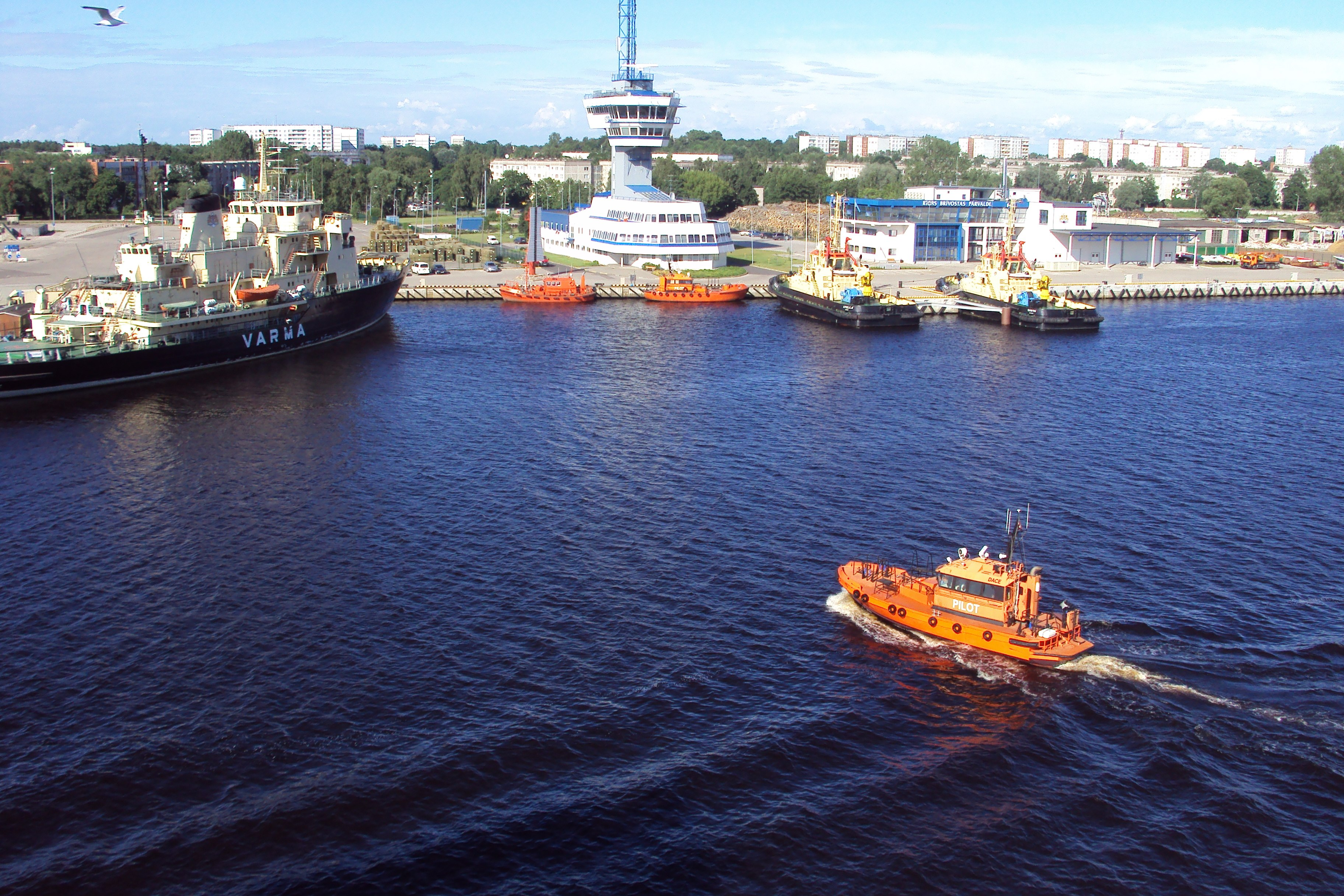 Rīgas brīvostas kapteiņa dienests